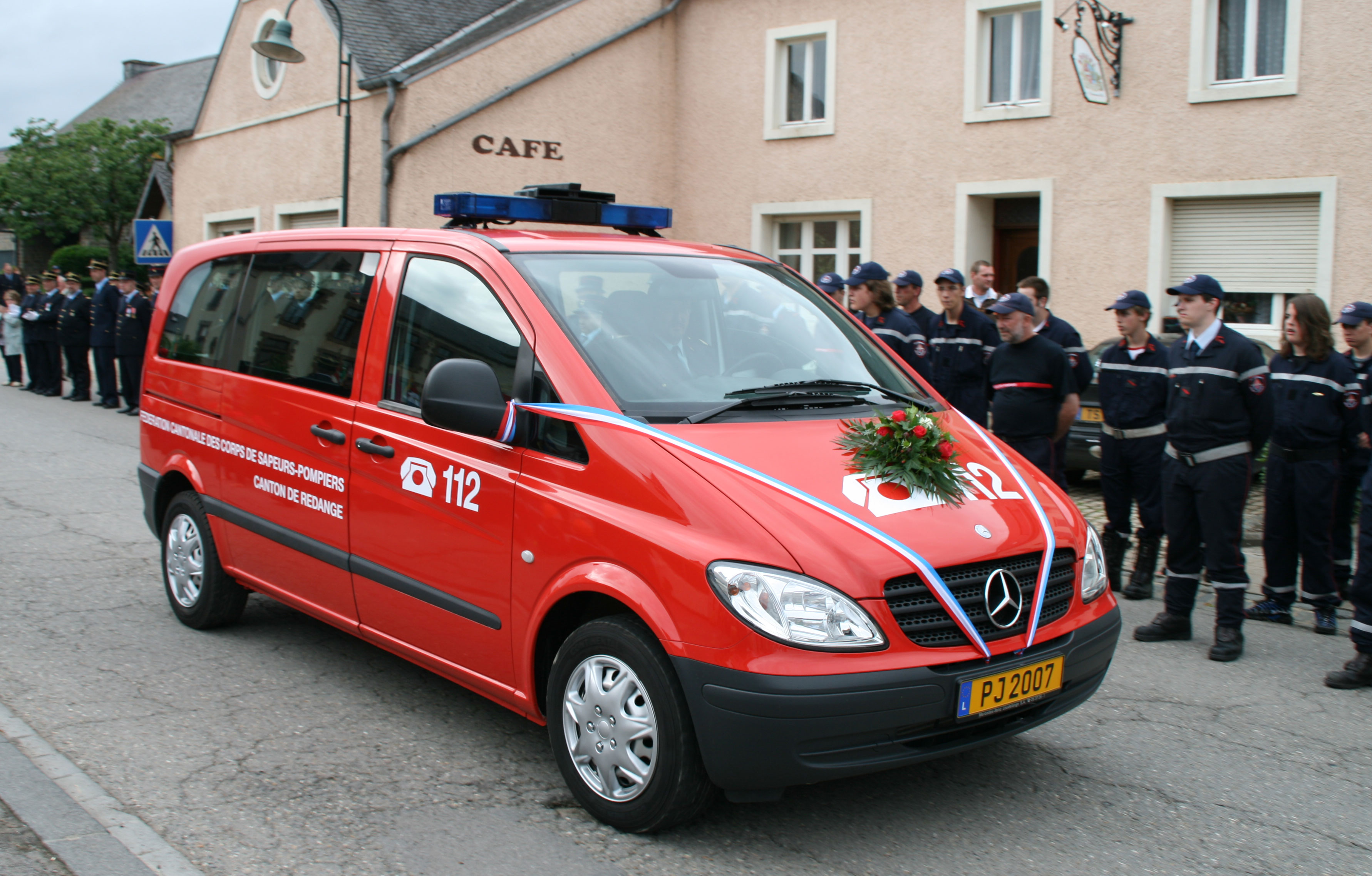 Kantonalfest Ell; neie Won.